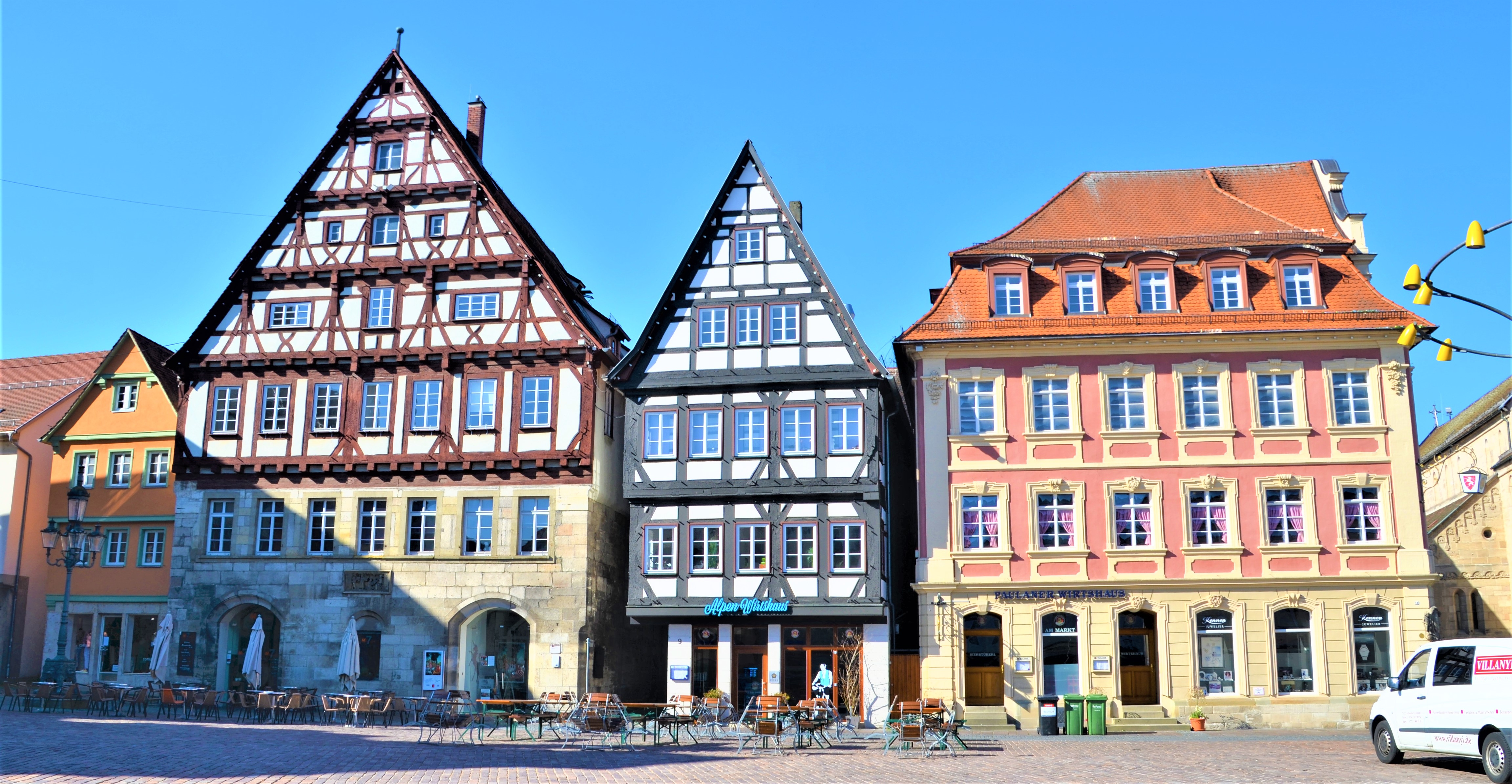 Grät, Haus Buhl, Haus Stahl